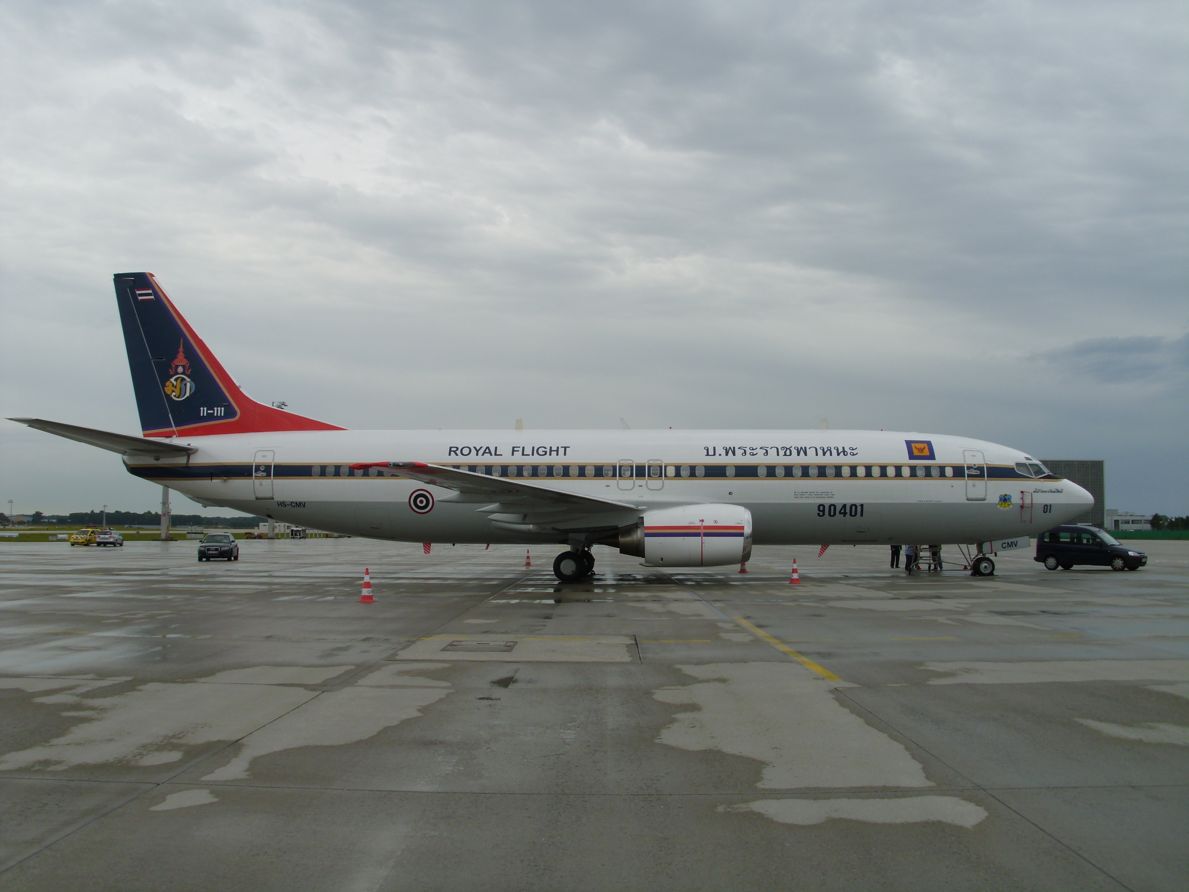 Gepfändete Boeing 737 des Kronprinzen von Thailand am Münchner Flughafen